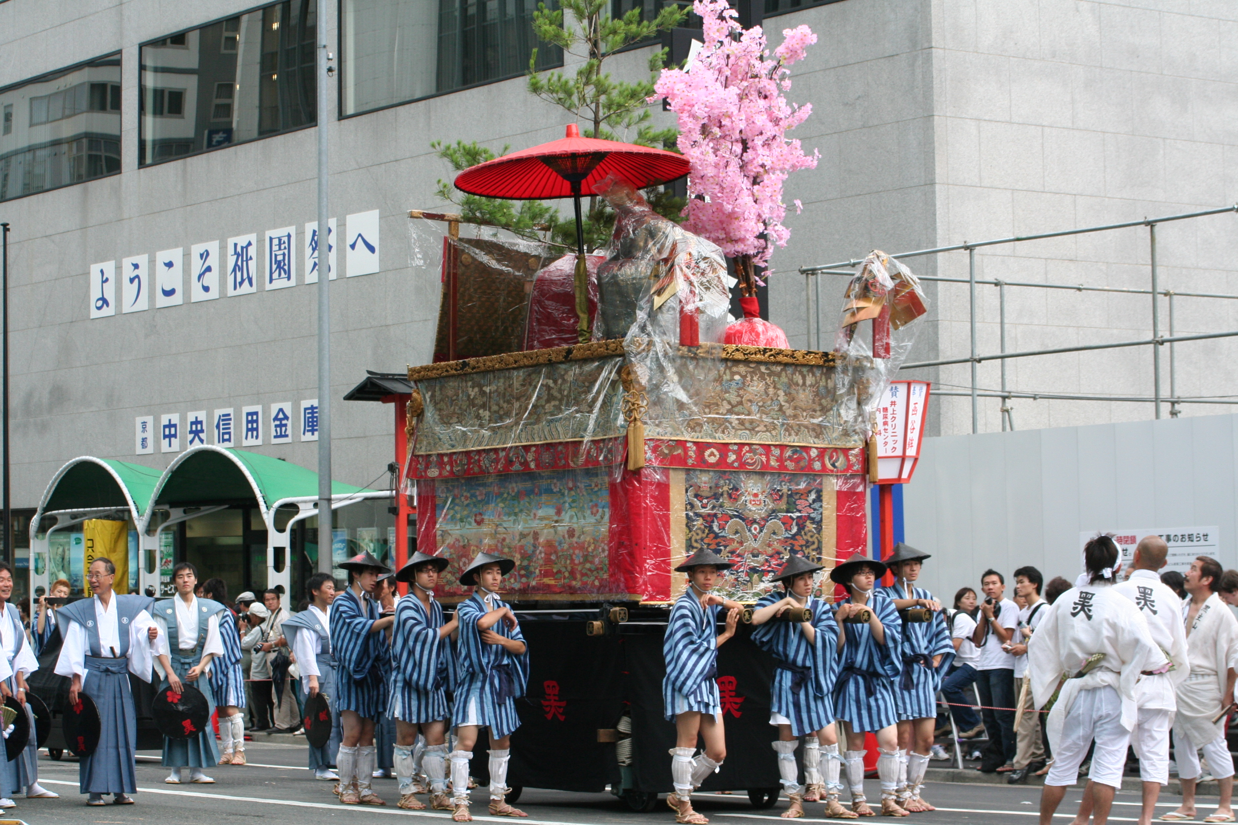 2009年7月17日に京都市で行なわれた祇園祭山鉾巡行の様子。 黒主山の山鉾。